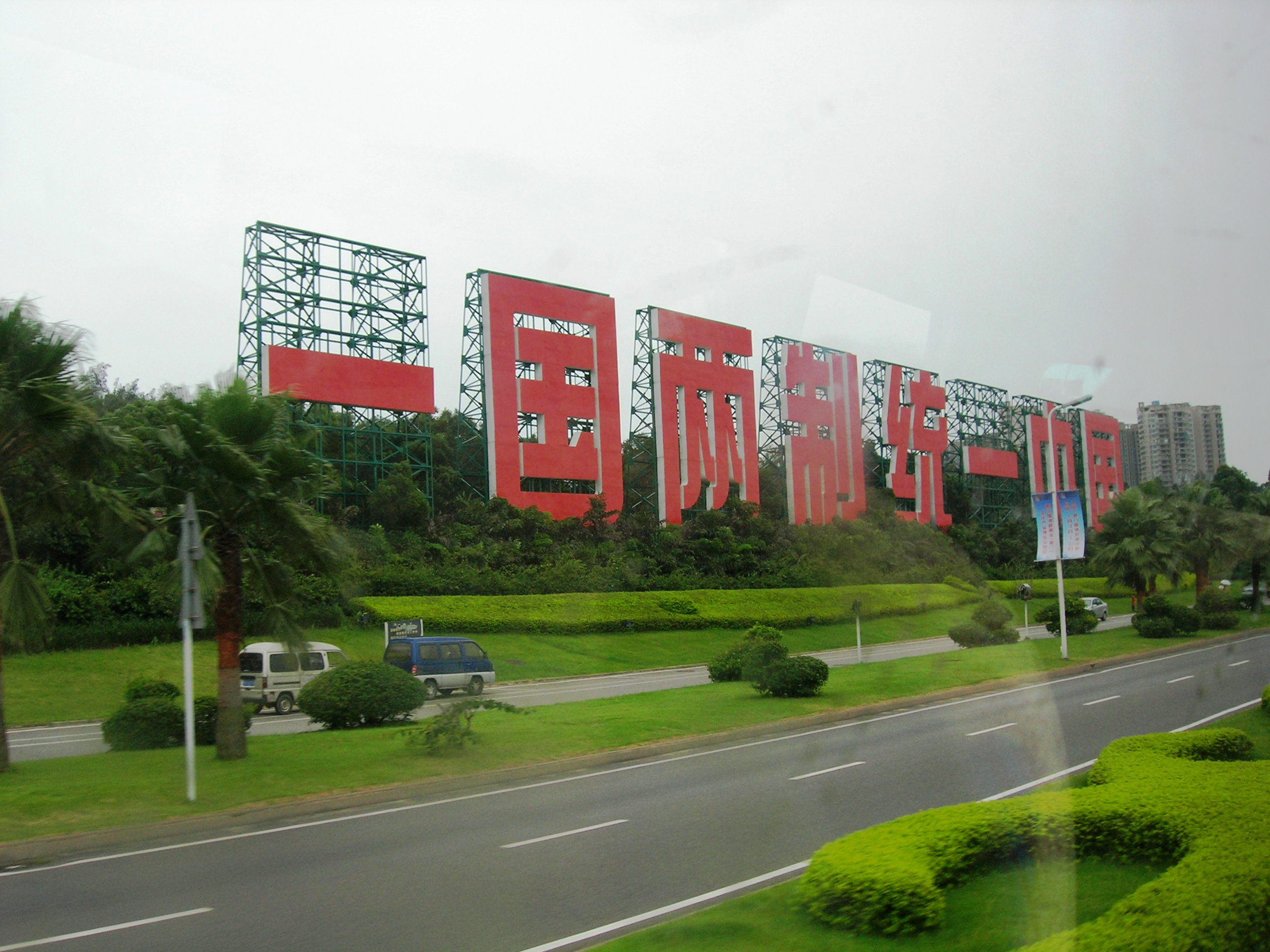 厦门市思明区环岛公路景色